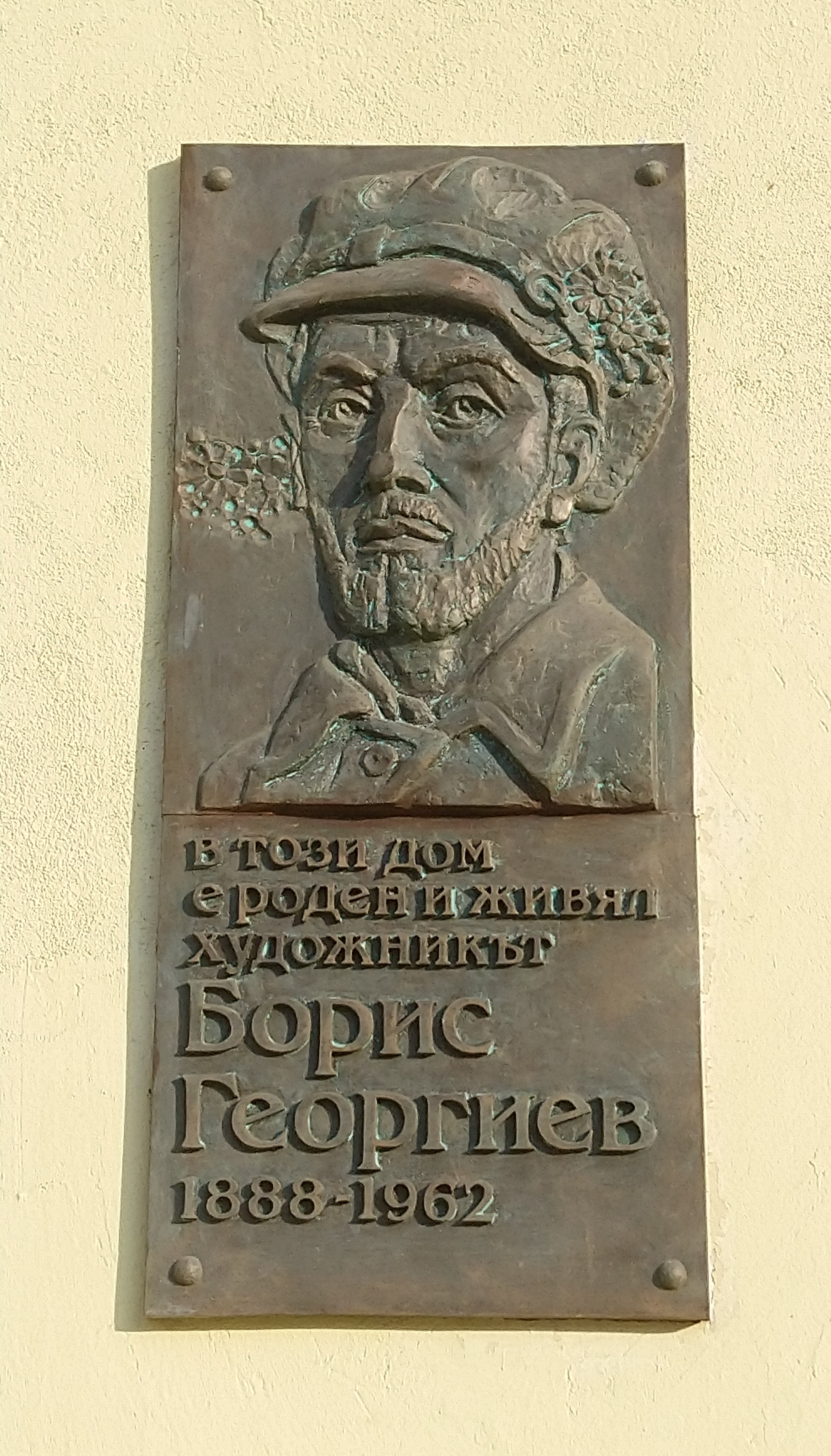 Паметна плоча на художника Борис Георгиев, Варна